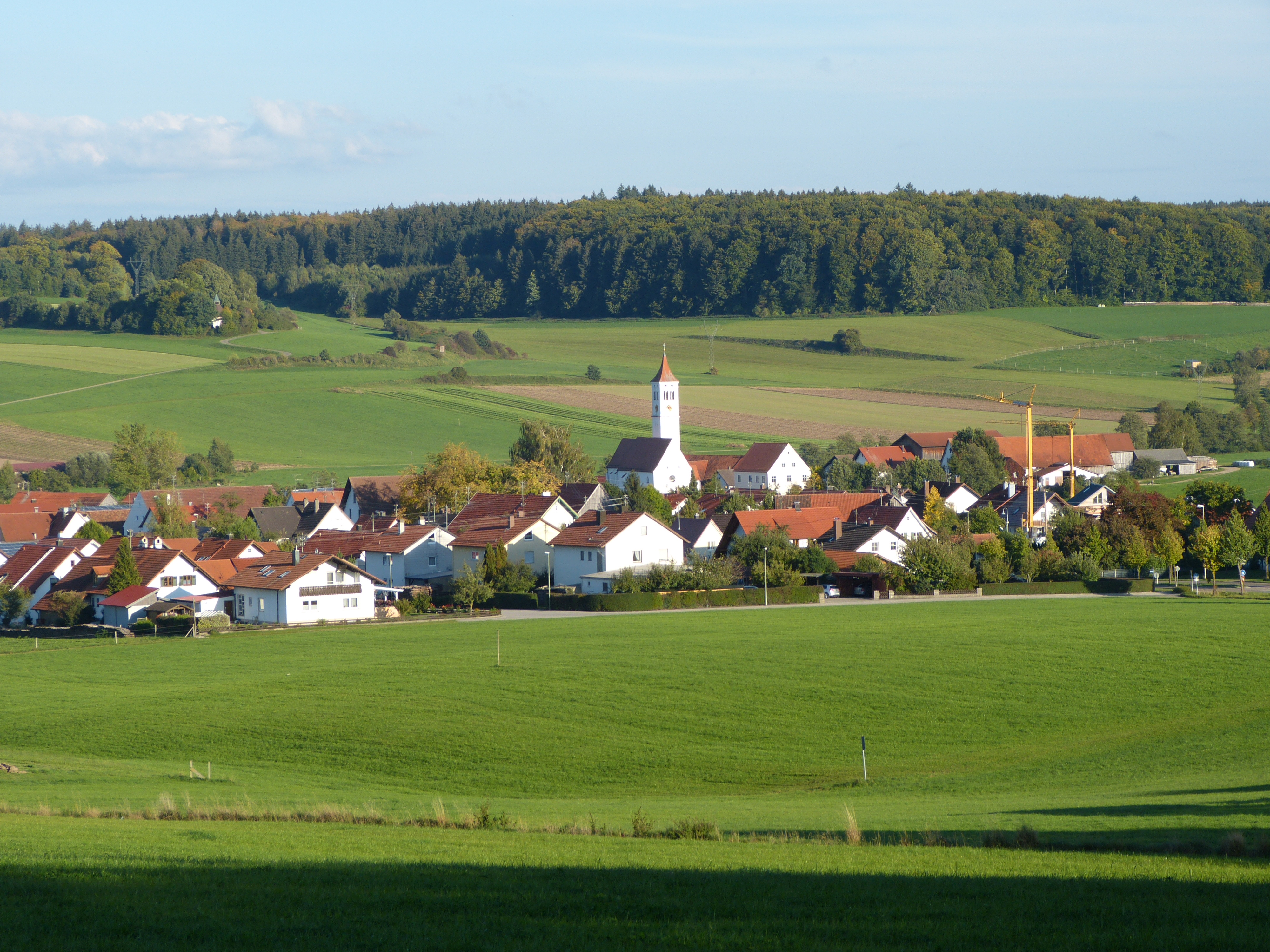 Dietershofen, Landkreis Unterallgäu, Bayern